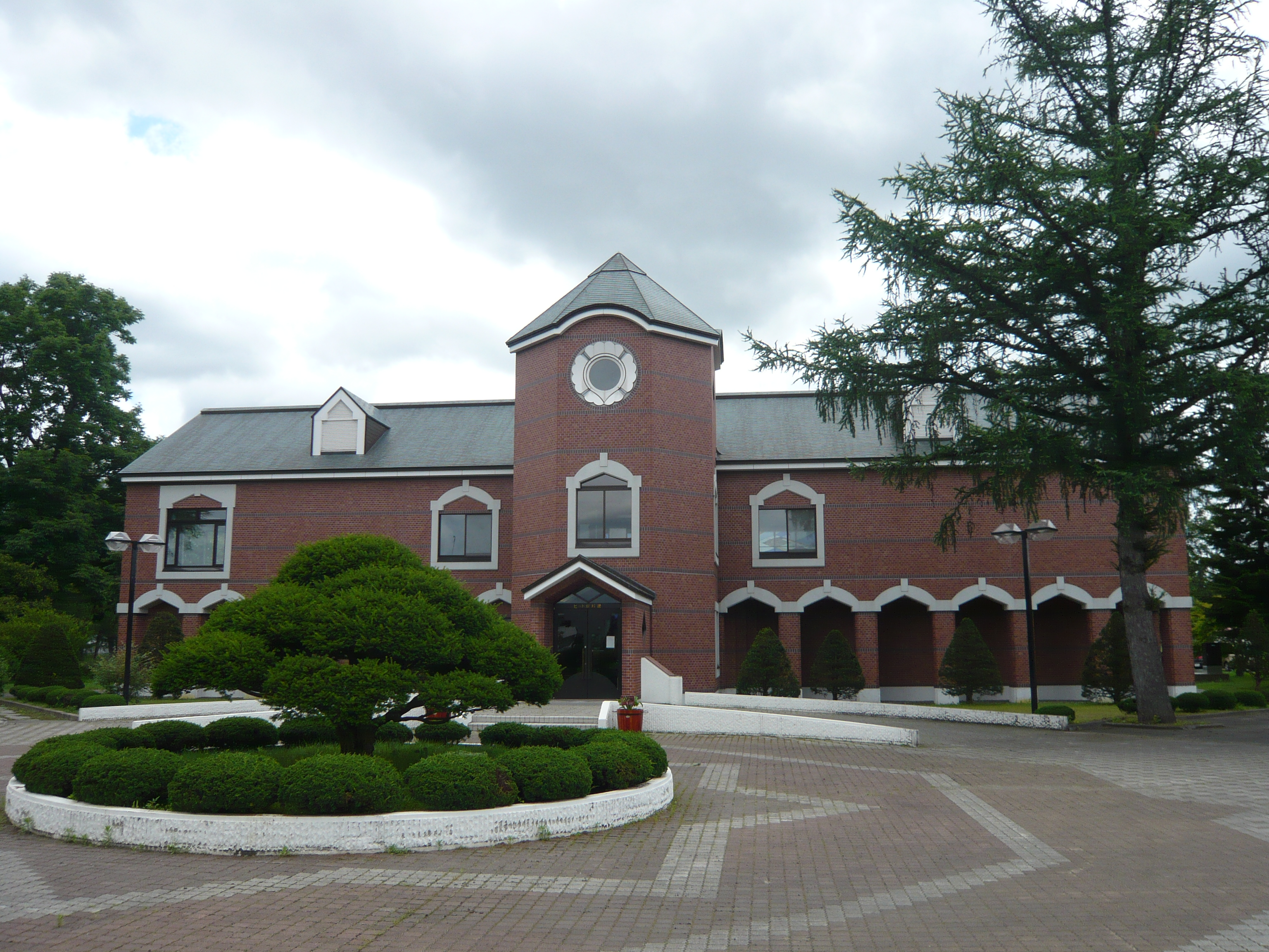 北海道帯広市のビート資料館（旧日本甜菜精糖帯広工場）